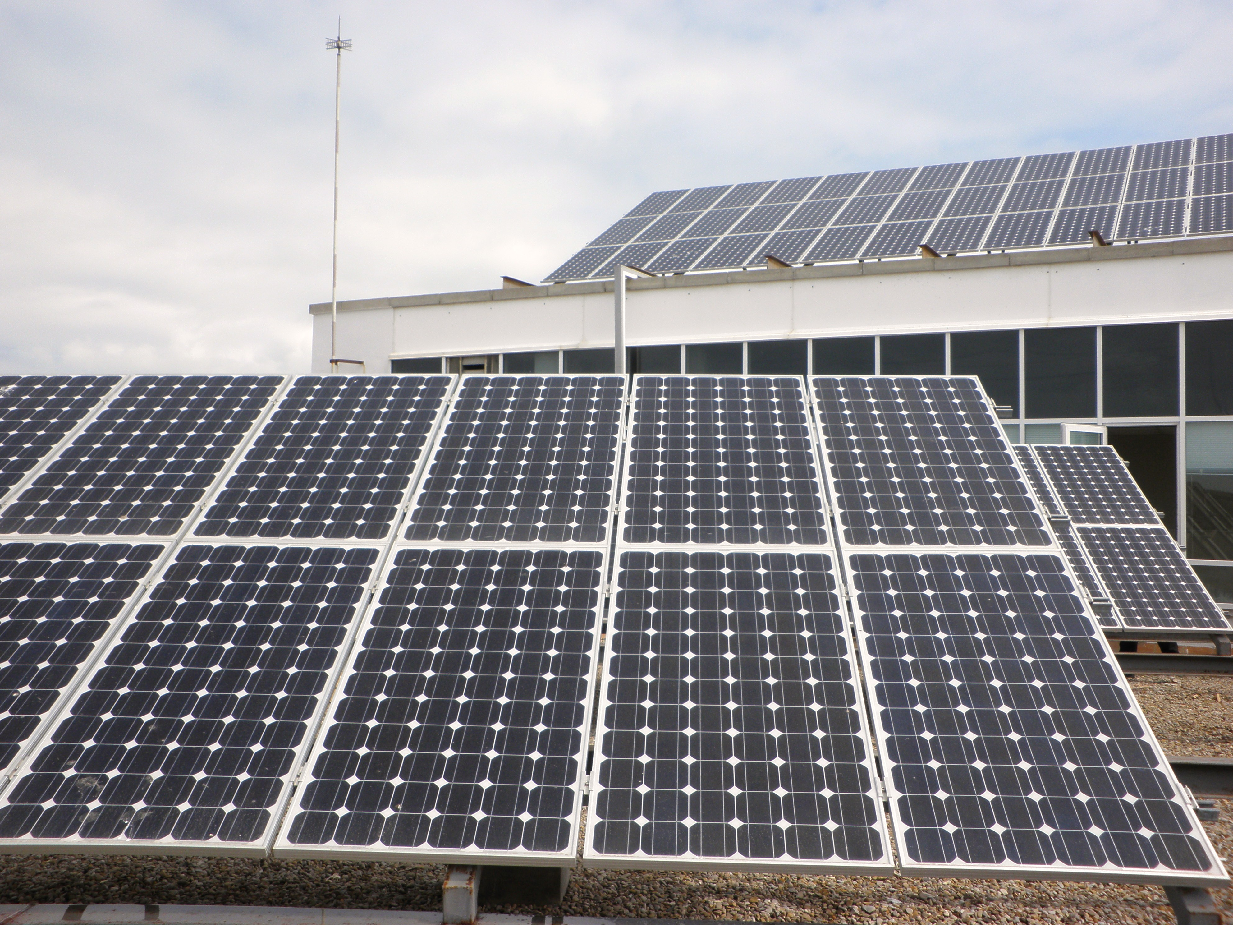 Placas solares en la azotea de la Facultad de Ciencias Económicas y Empresariales, Universidad de Cádiz, España.